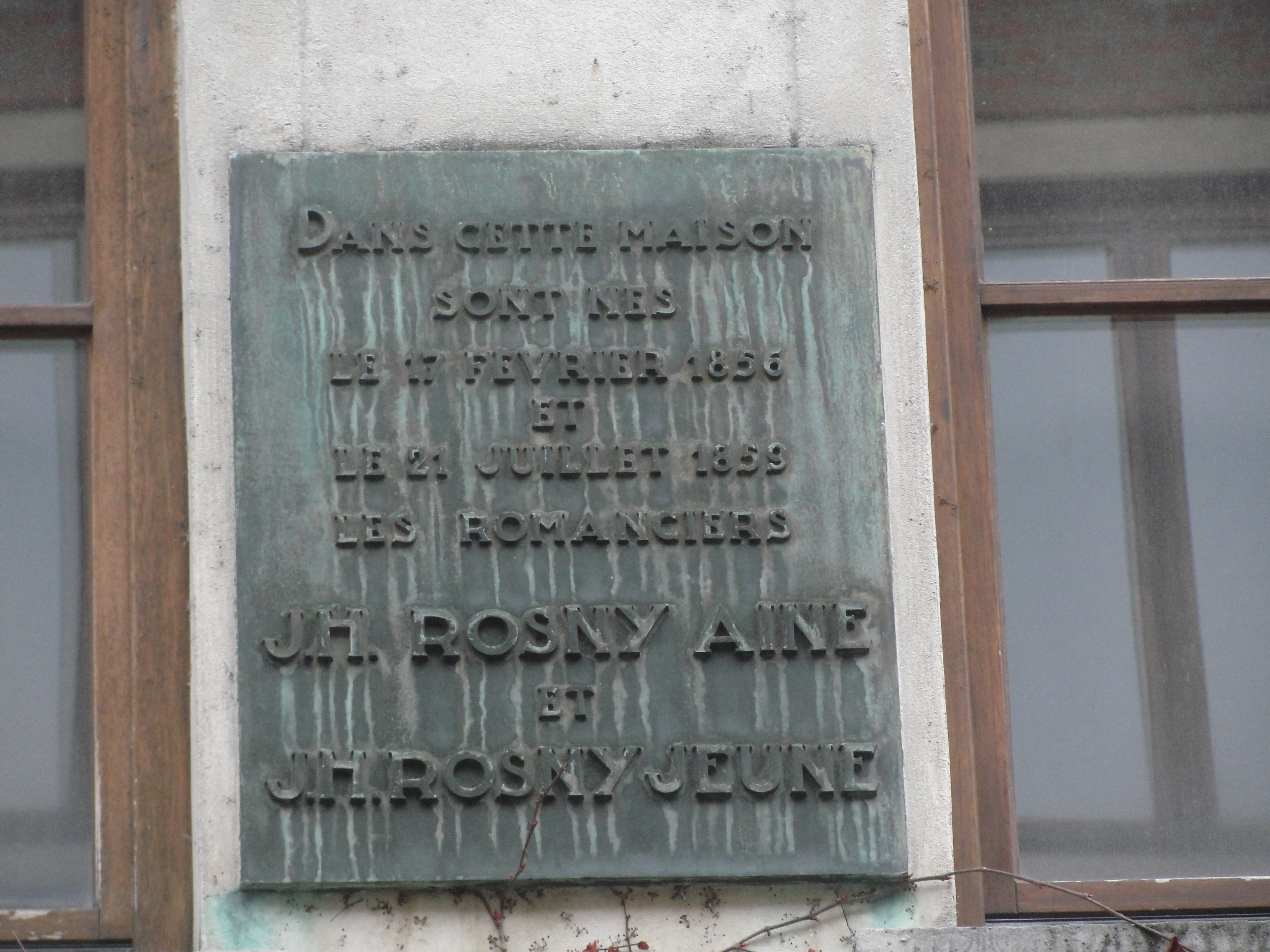 Plaquette mentionnant la naissance des frères écrivains JH Rosny dans cette maison, sise 77 rue du Marché au Charbon, Bruxelles